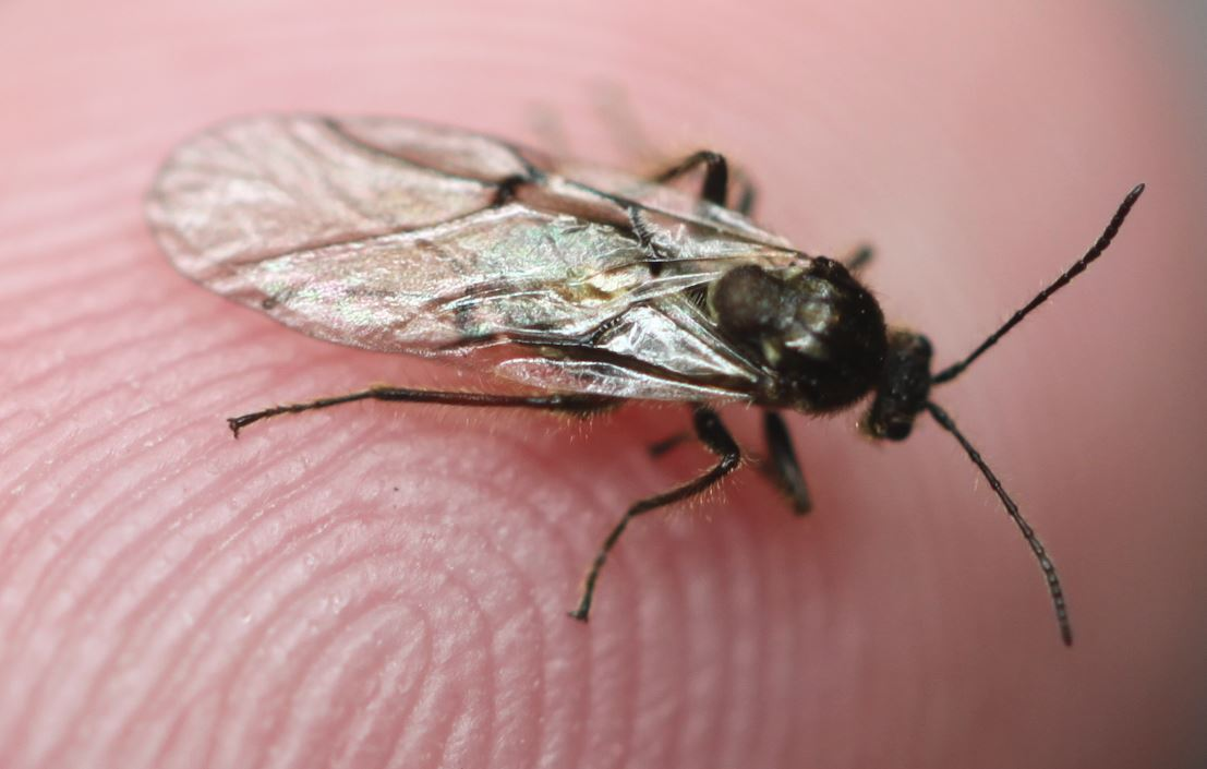 Gemeine Eichengallwespe (Cynips quercusfolii) am 3. Januar 2020, geschlüpft aus einer Eichengalle